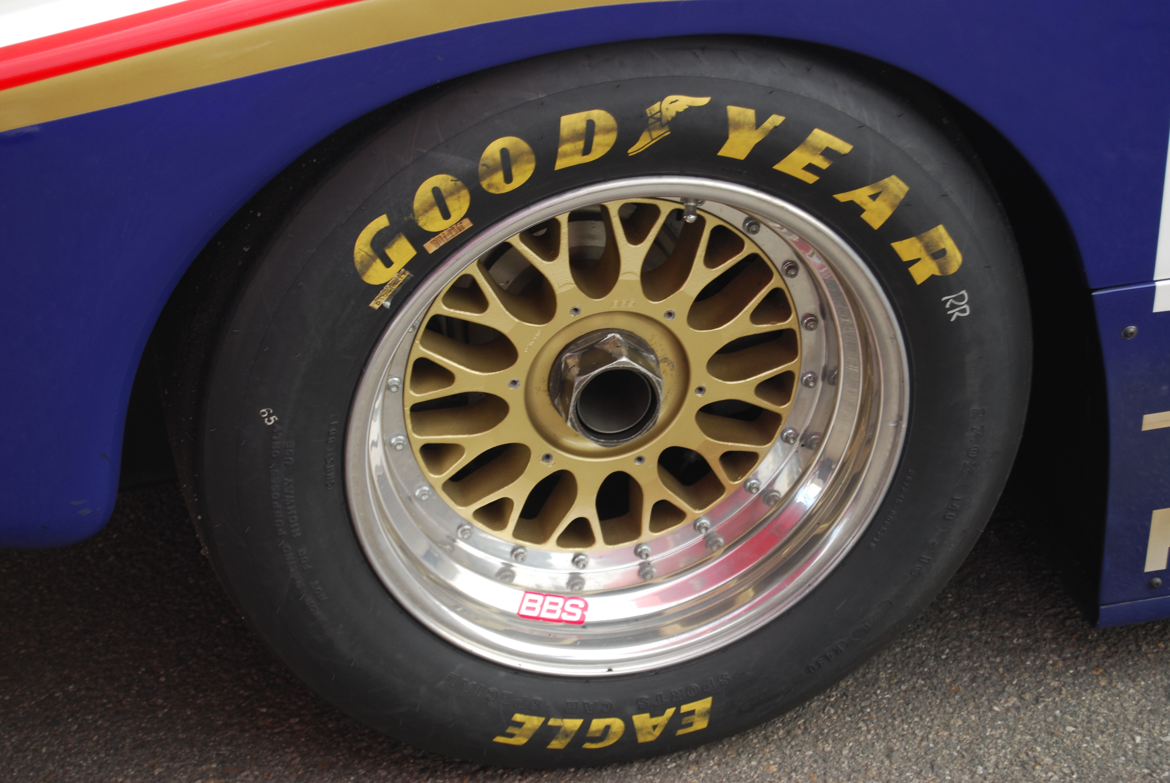 6e10_DSC_0413